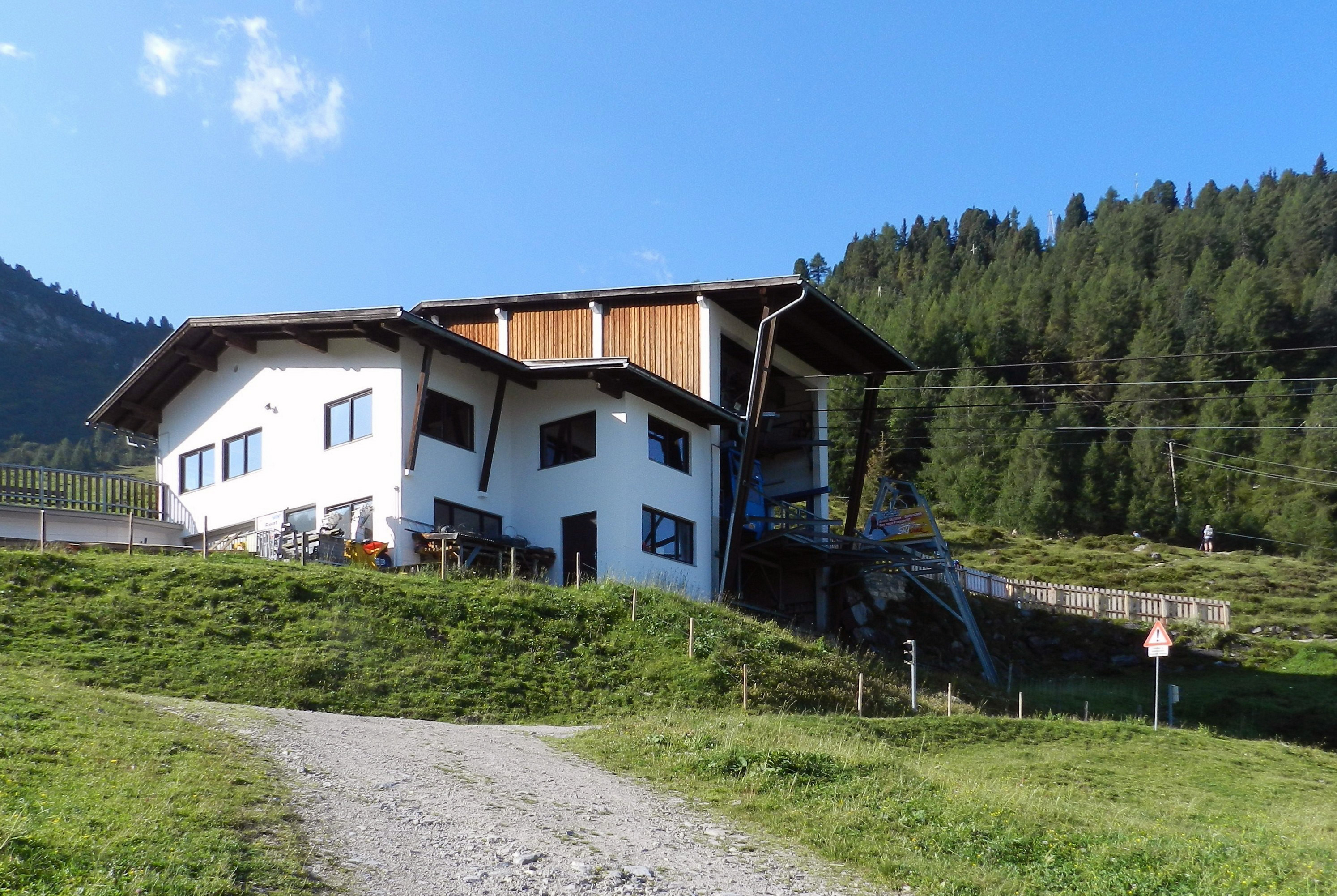 Bergstation der Gerslossteinbahn (Zillertaler Alpen, Tirol, Österreich)